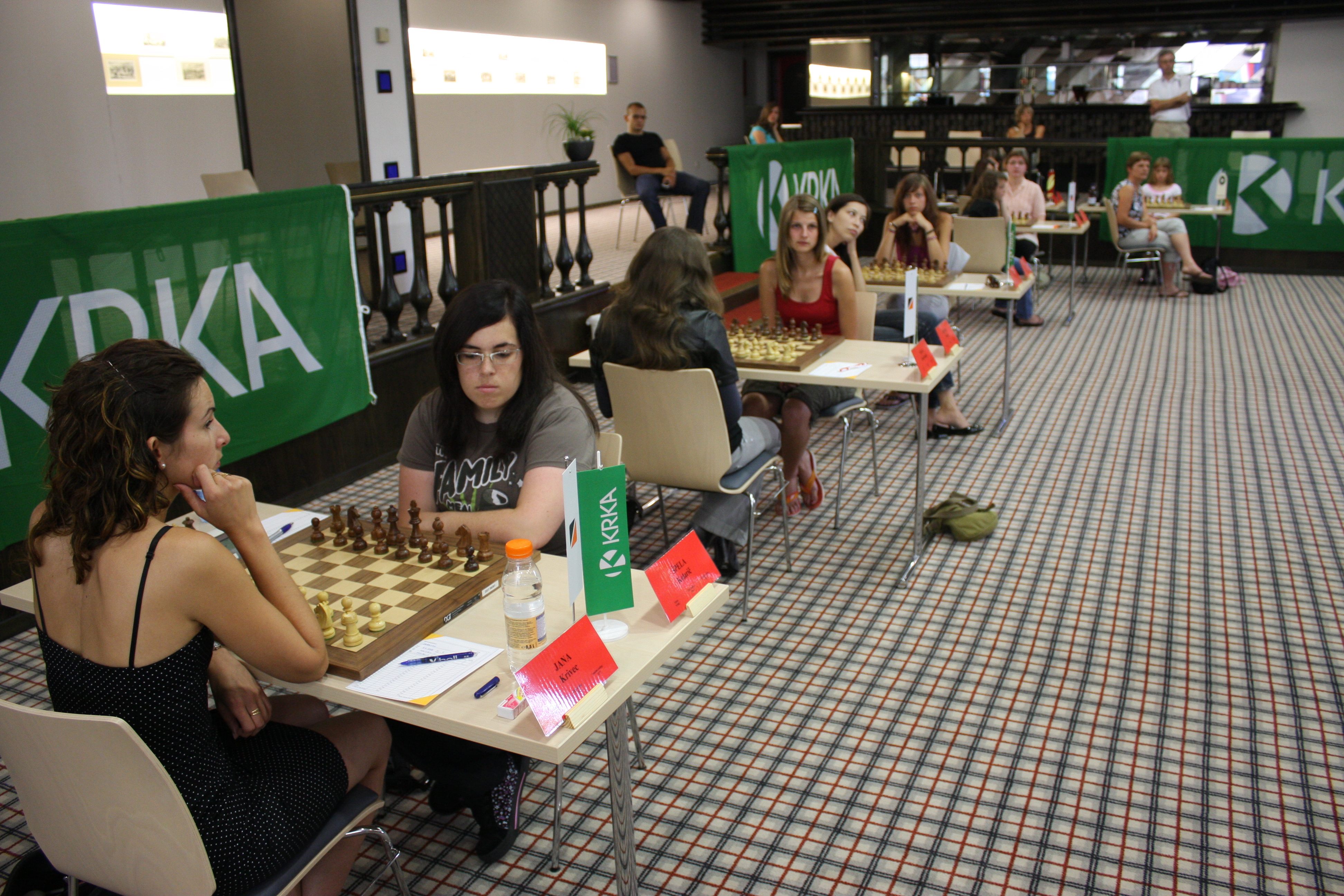 Prvenstvo Slovenije v šahu, Otočec 2009 Slovenian Chess Championship, Otočec 2009